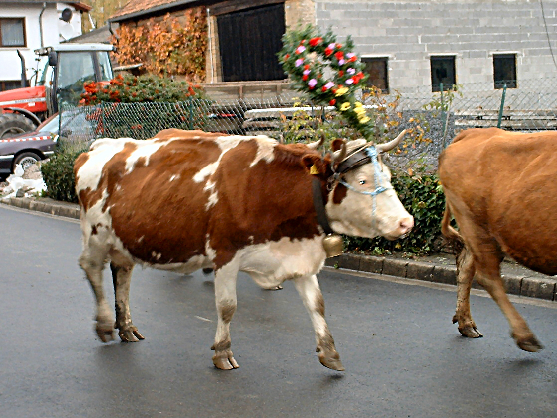 Bearbeitete Version von Image:Weideabtrieb.jpg durch Nyks ►? Original-Beschreibung: (Uploaded by Benutzer:Schlemmer) Summary Weideabtrieb 2004 Foto Torsten Schlemmer thumb|Original Uploaded with Reworkhelper